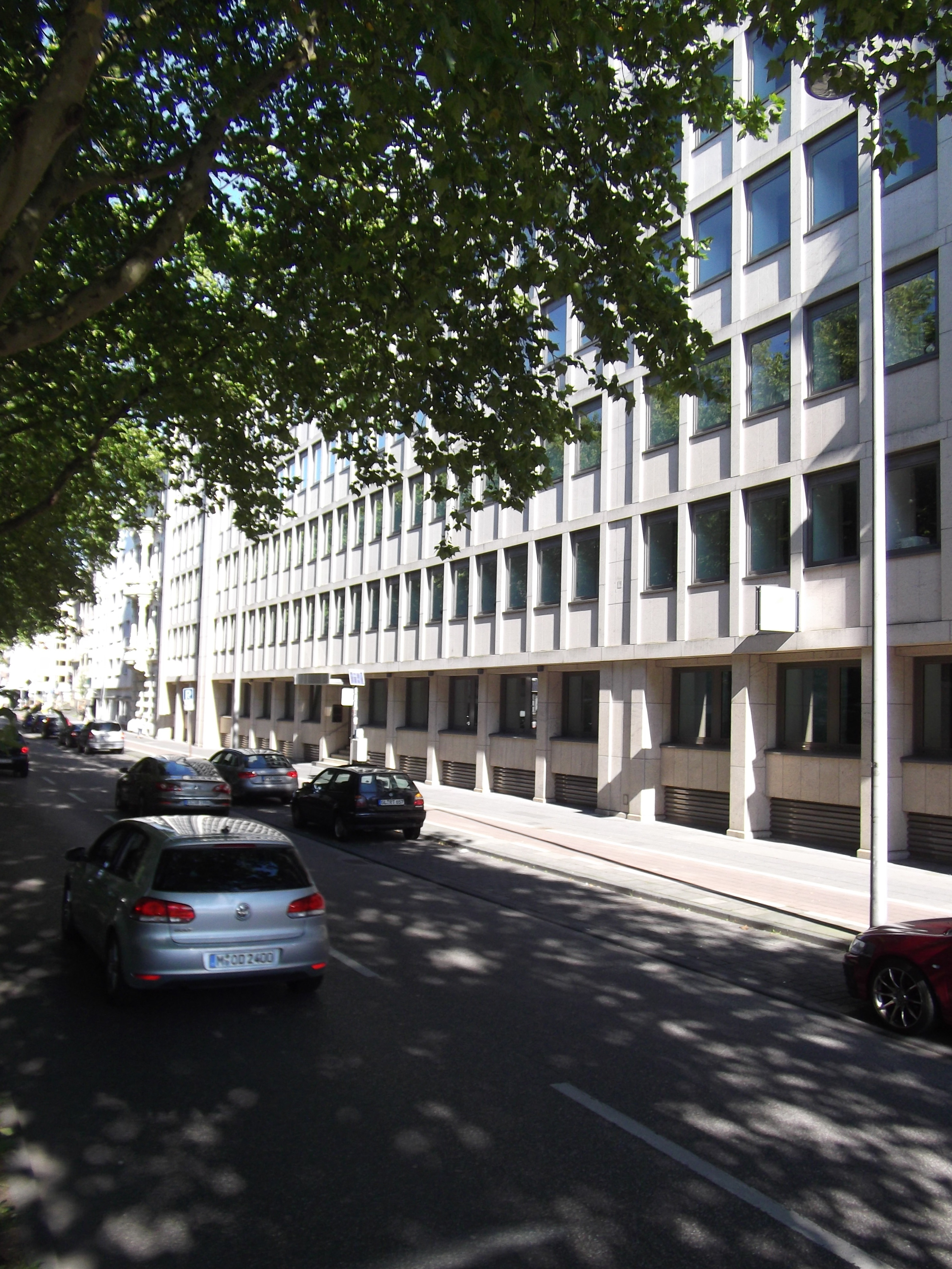 Central Krankenversicherung Hauptverwaltung, Hansaring 42-50 (Köln)